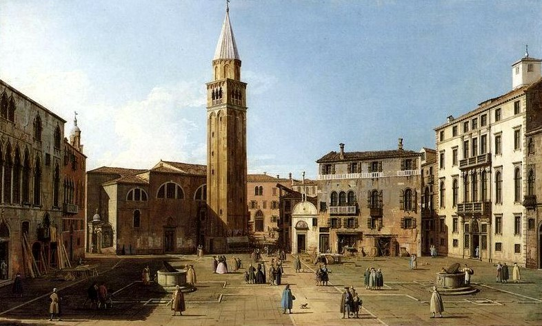 Campo Sant'Angelo con la chiesa omonima, oggi abbattuta.label QS:Lit,"Campo Sant'Angelo con la chiesa omonima, oggi abbattuta."